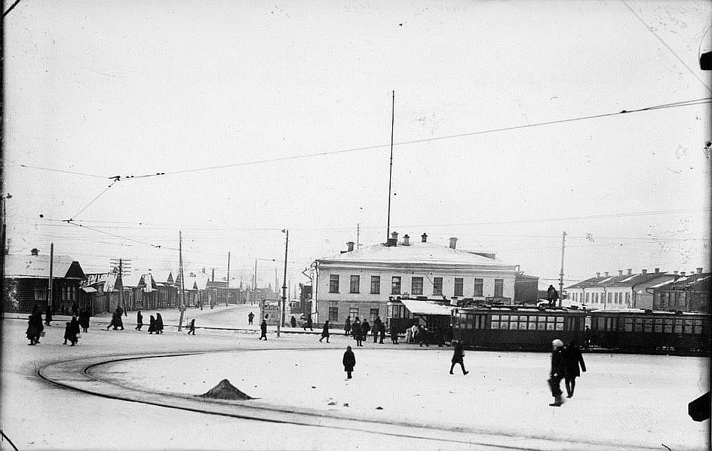 Конечная станция трамвая «ВИЗ» на Площади субботников. За кольцом видна однопутная трамвайная линия по ул. Заводской